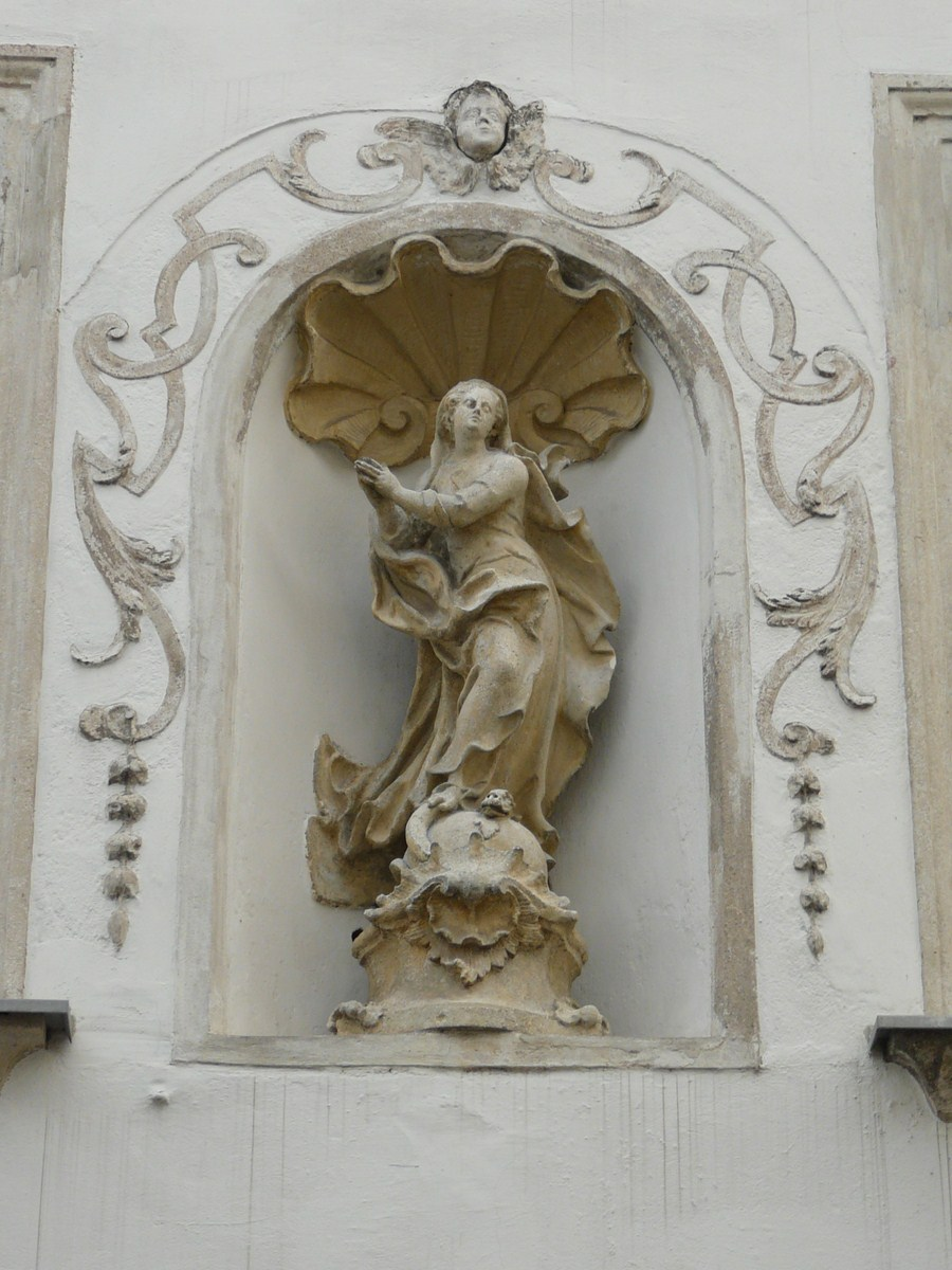 Steiner Landstr. 19 - Madonna